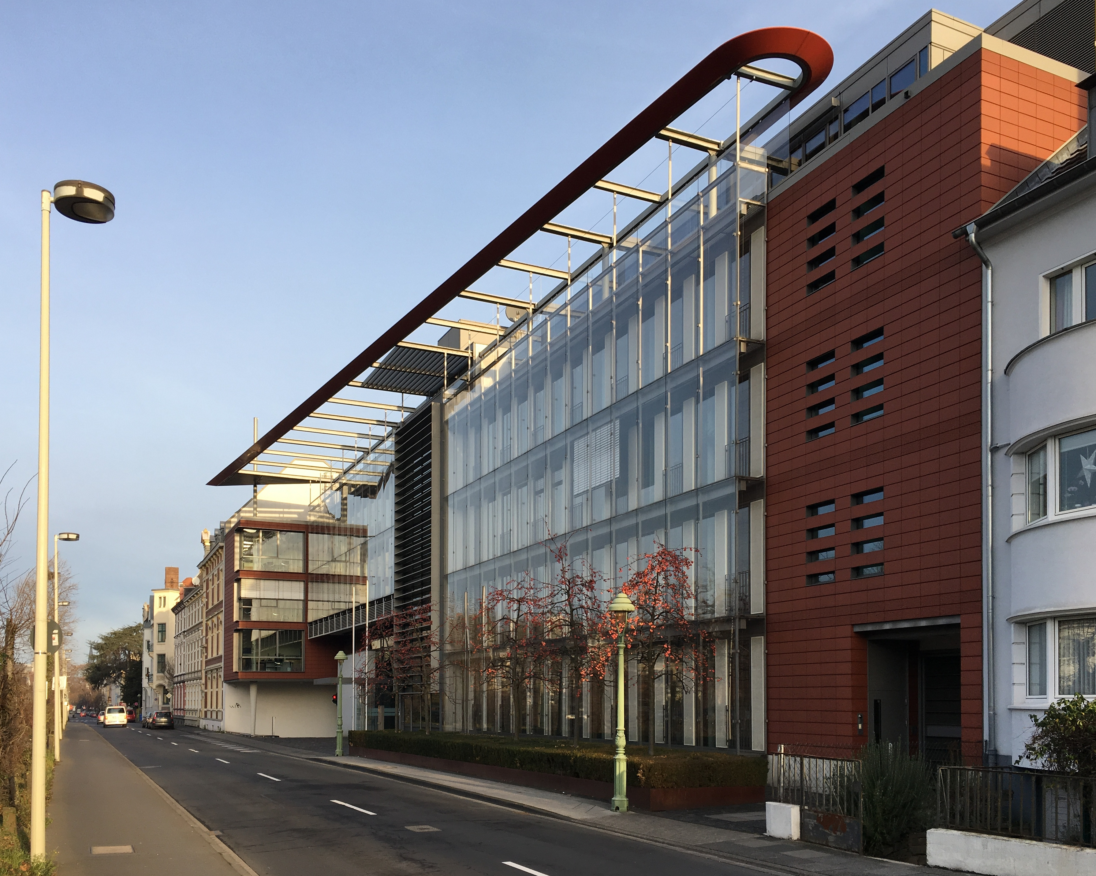 Deutschland, Bonn-Gronau: Sitz des Sekretariats der Deutschen Bischofskonferenz, Kaiserstr. 161